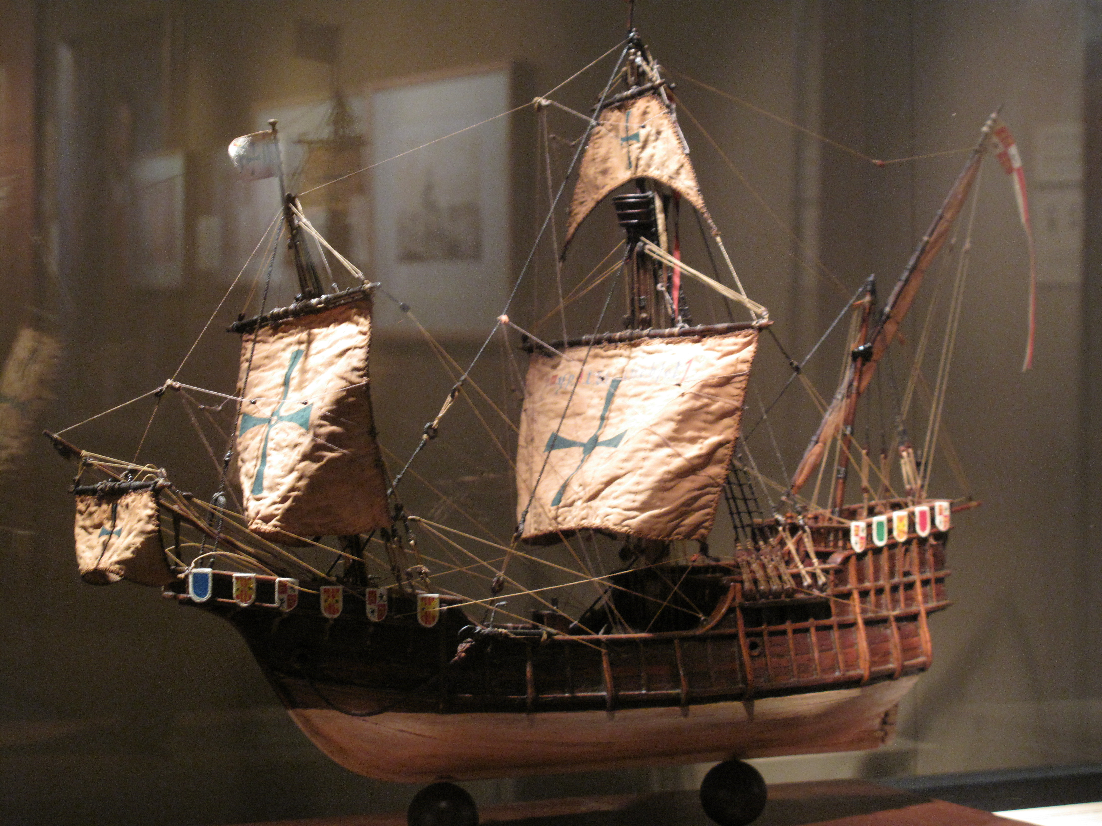 Modelo conjetural de la Nao Victoria utilizada por Juan Sebastián Elcano para dar por primera vez la vuelta al mundo. Modelista Serafín Murugarren (1955)